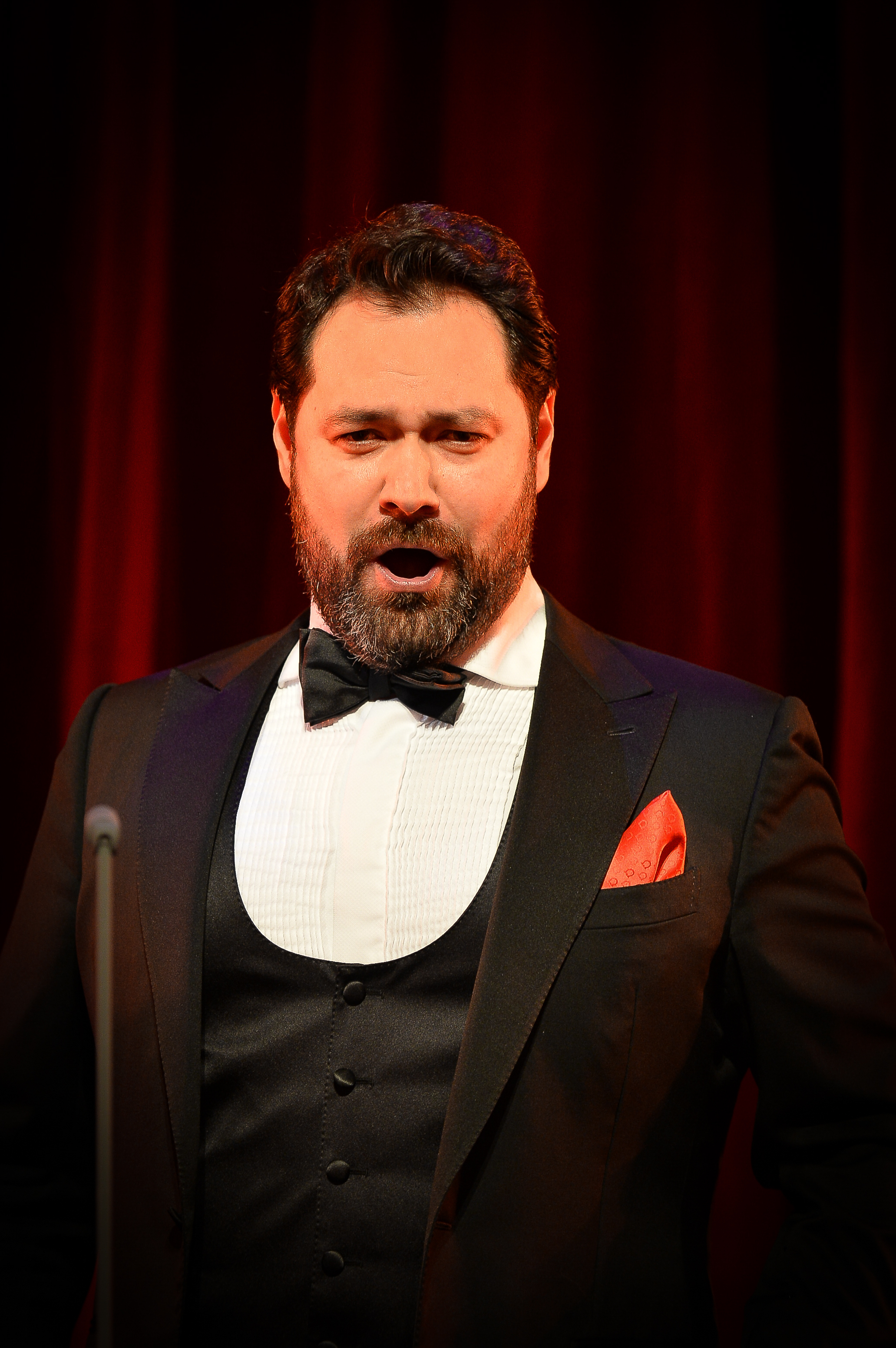 Ildar Abdrazakov photographié par Gil Zetbase Gala Russe Monaco 2018